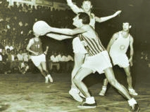 Atilio Fruet jugando para Olimpo frente a Alberto Cabrera de Estudiantes.